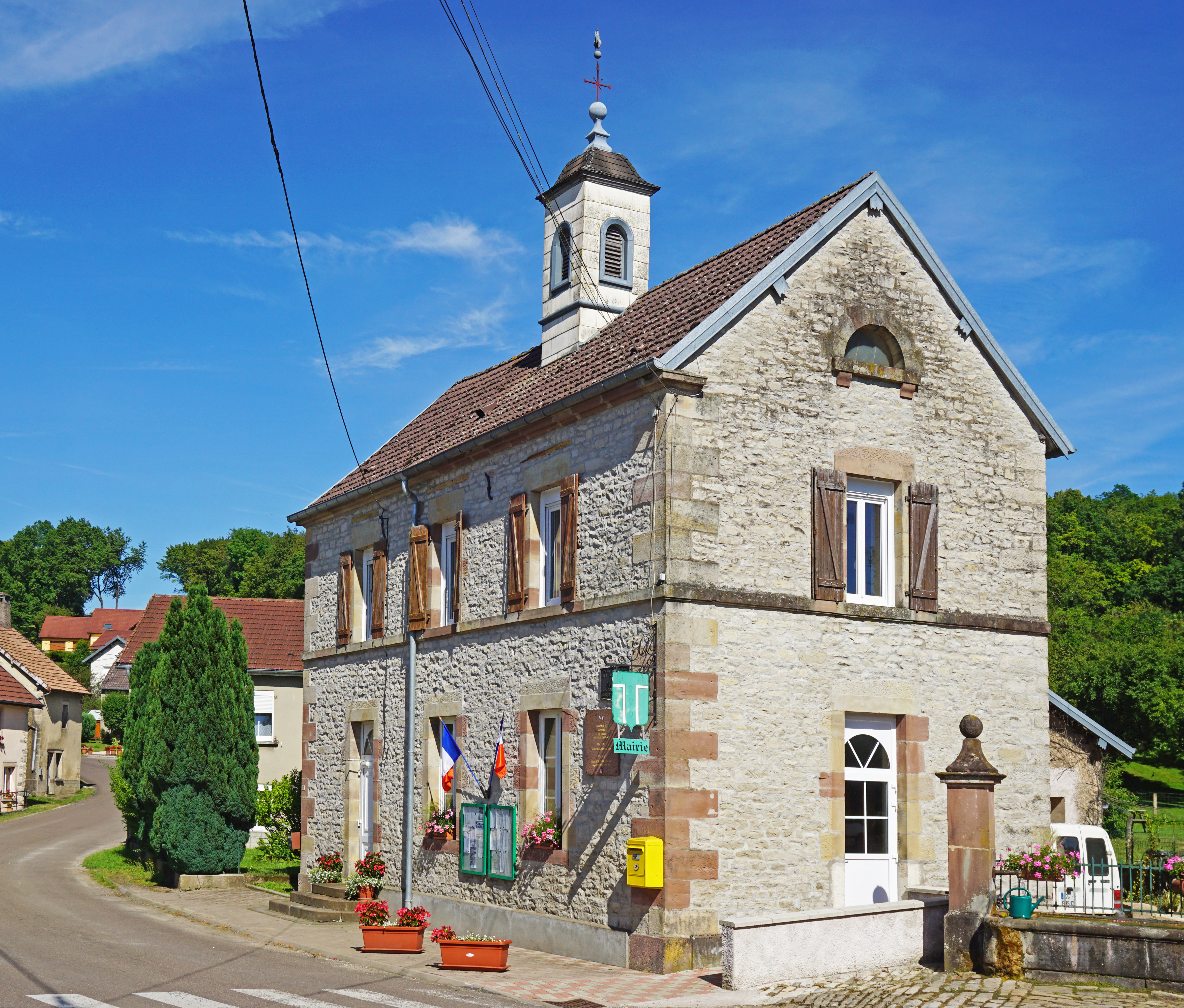 Mairie de Georfans.